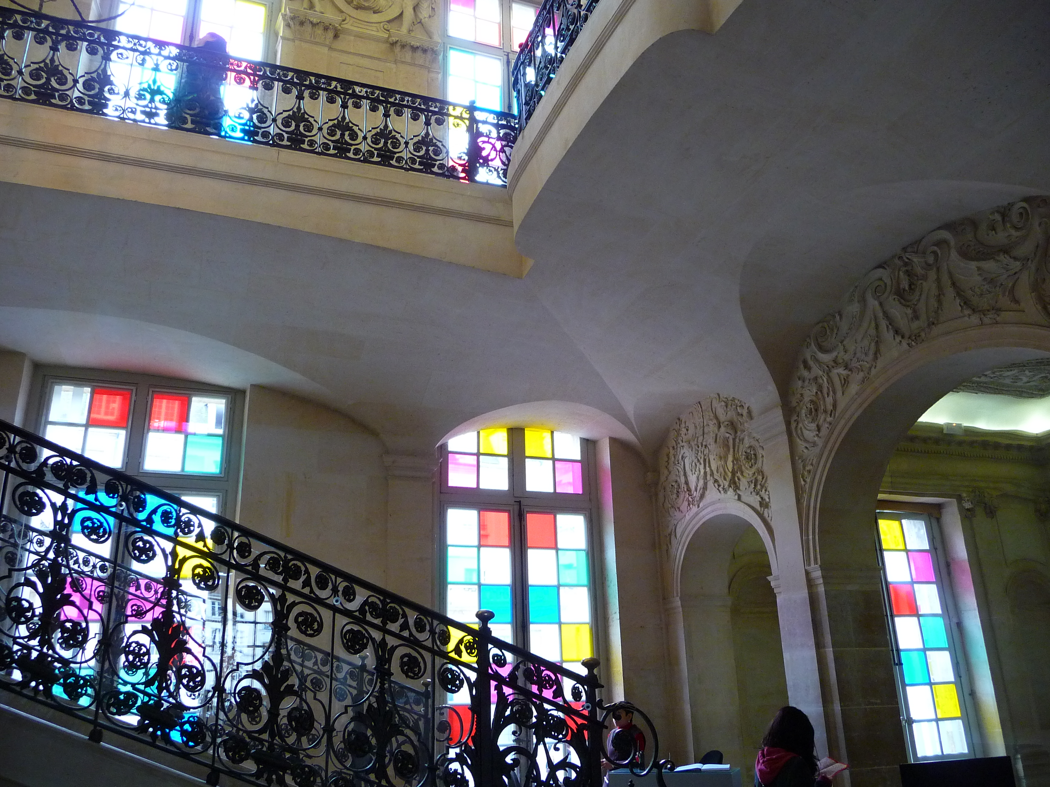 A l'interieur du musée Picasso (Hôtel Salé) à Paris.